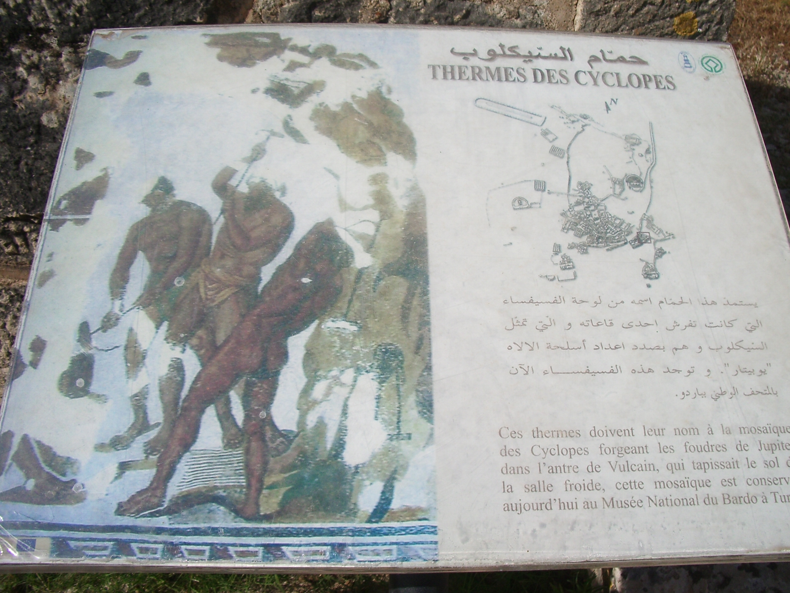 Dougga termes dels cíclops